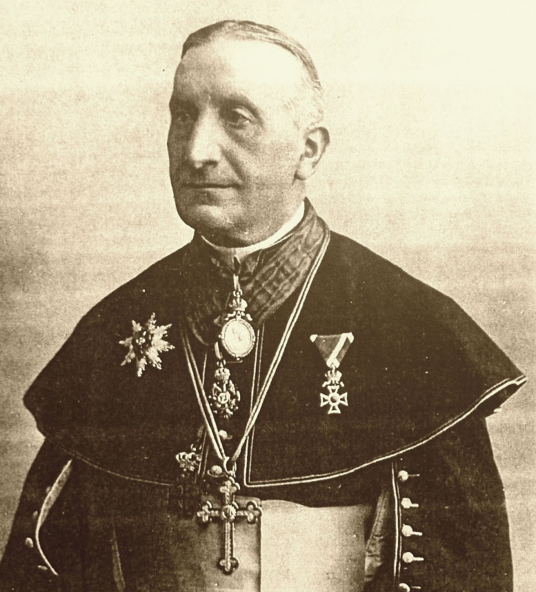 Hermann Zschokke 1838-1920 Weihbischof in Wien (1910-1920) Ritter vom Heiligen Grab